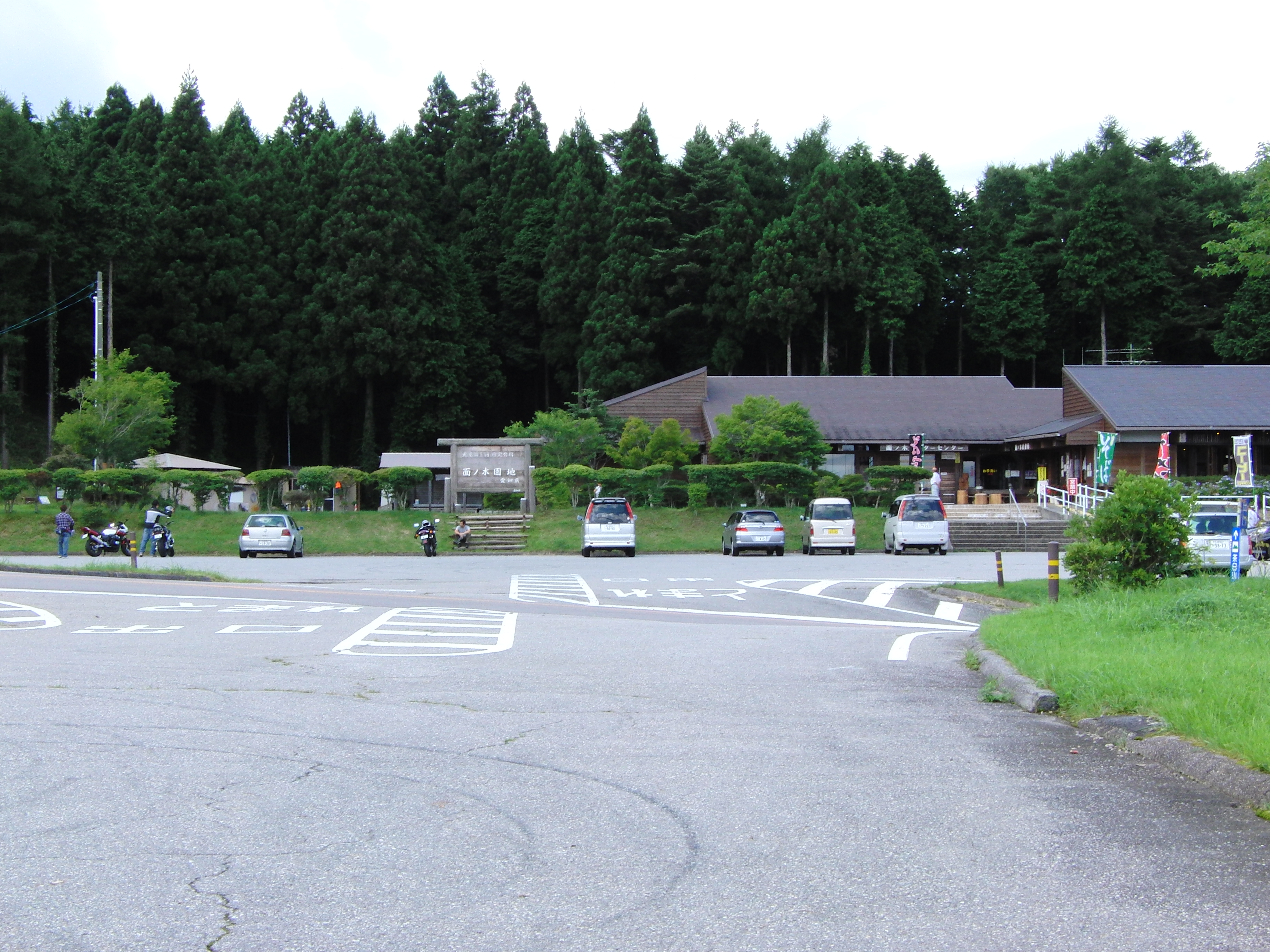 愛知県北設楽郡設楽町津具の面ノ木休憩所ビジターセンター